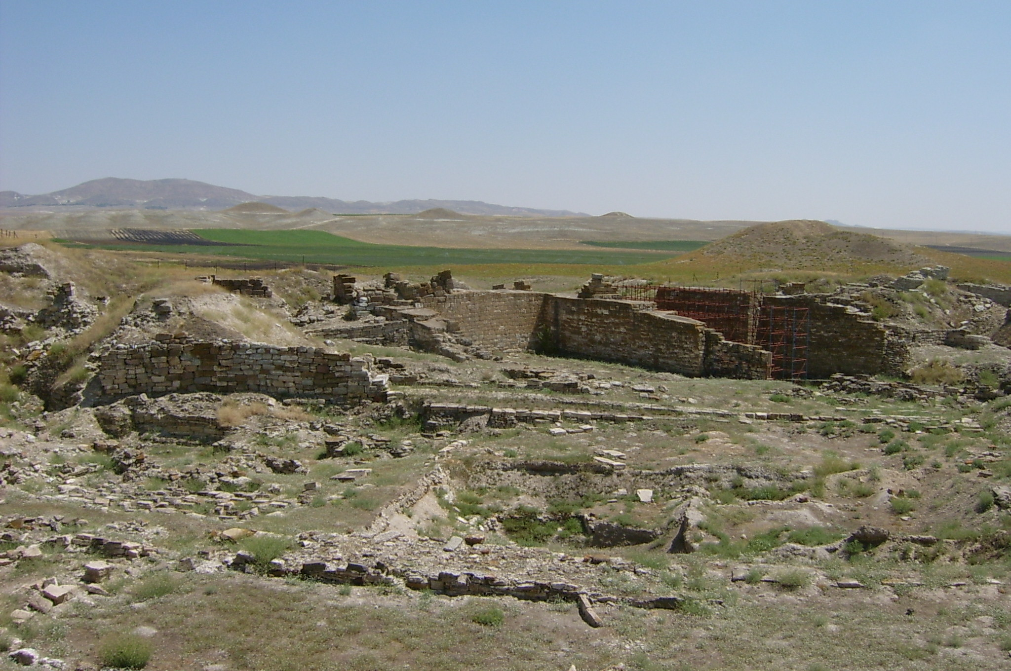 Ruins of Gordion, capital of Phrygian kingdom Ερείπια του Γορδίου, πρωτεύουσας της Φρυγίας